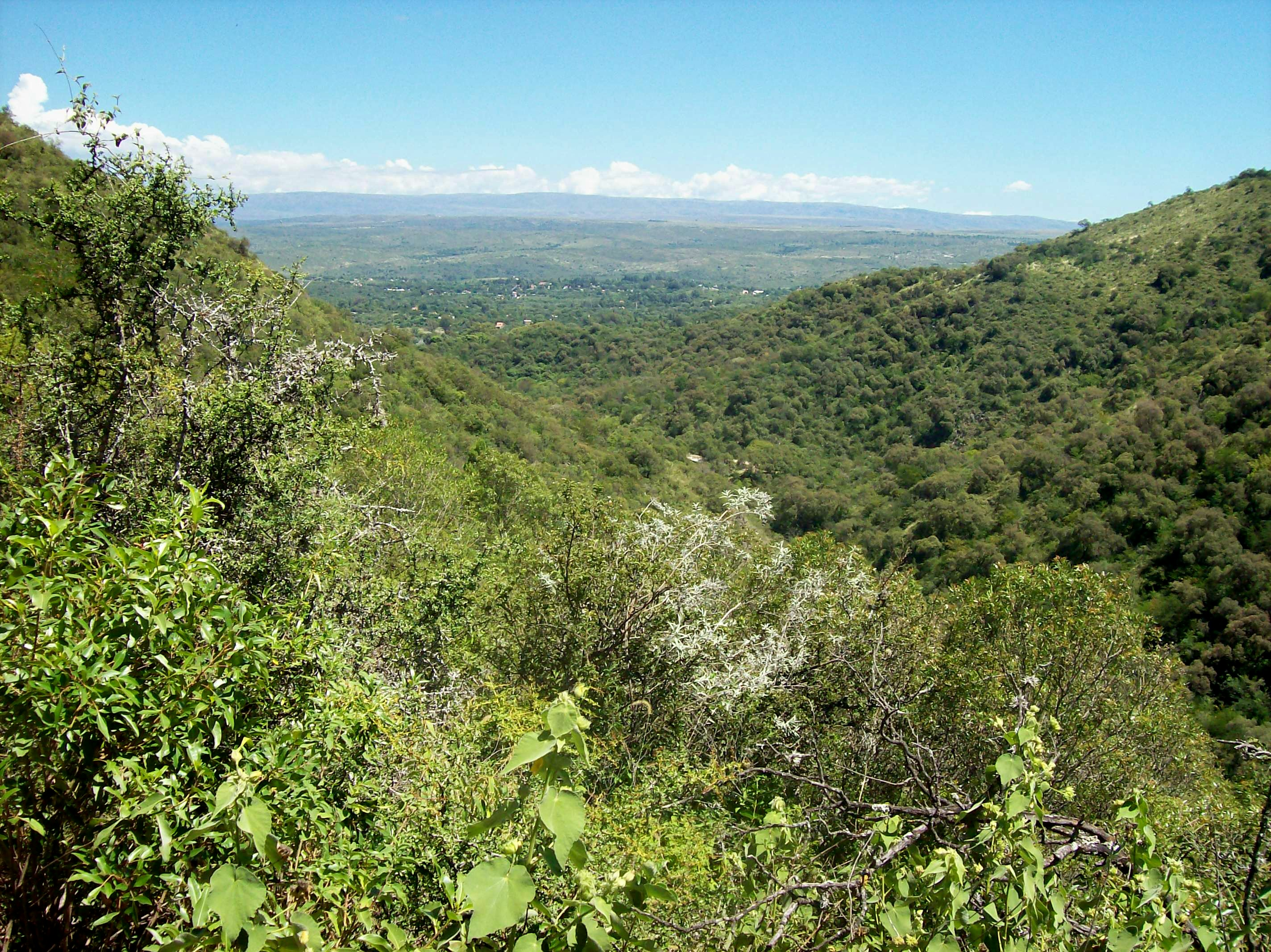 Vista desde Vaquerías de Valle Hermoso, pcia. de Córdoba, Argentina. Las coordenadas dadas son aproximadas, con (estimo) no más de 300 m de error de la posición correcta